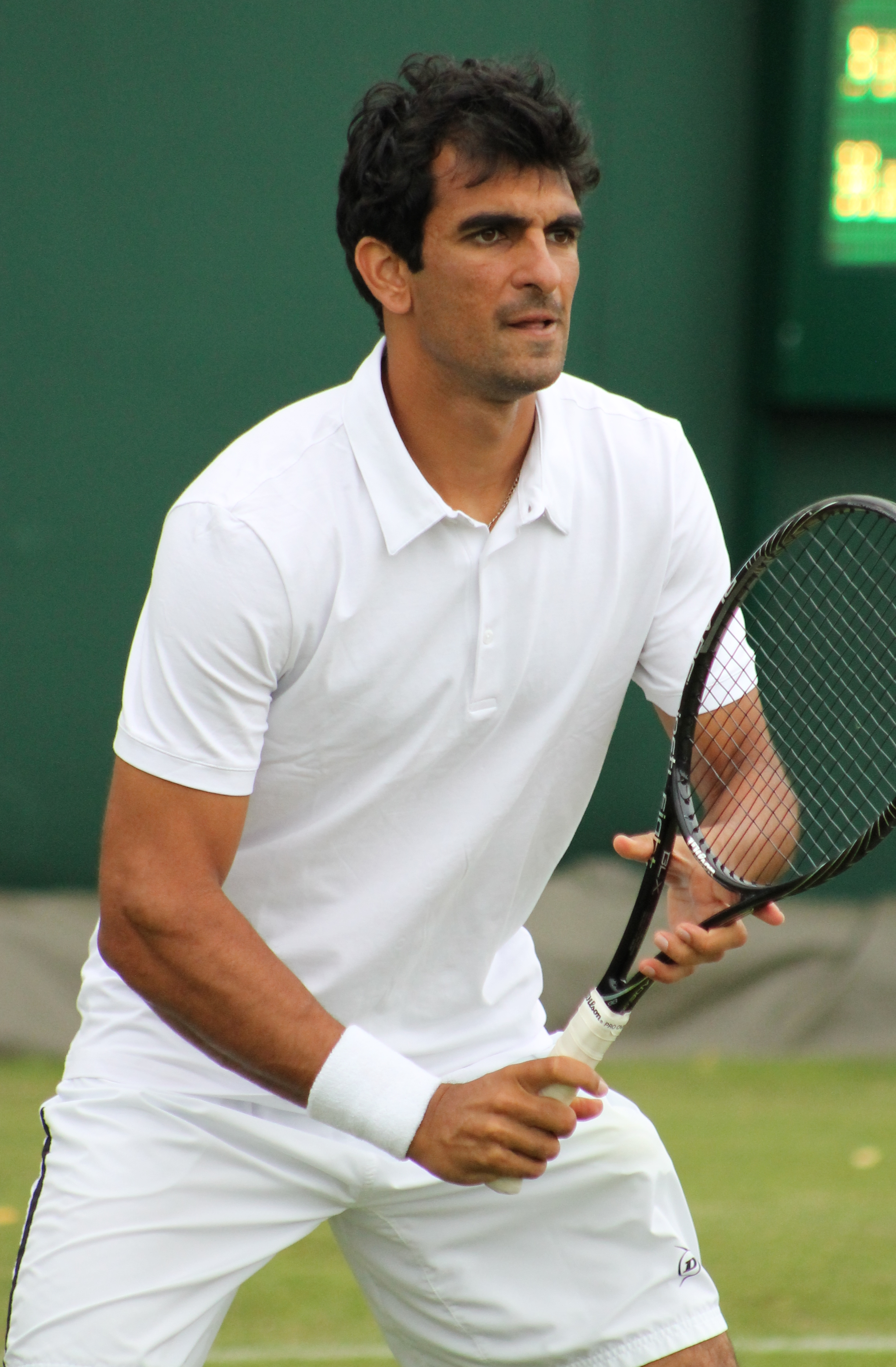 Junaid WMQ14 (1)